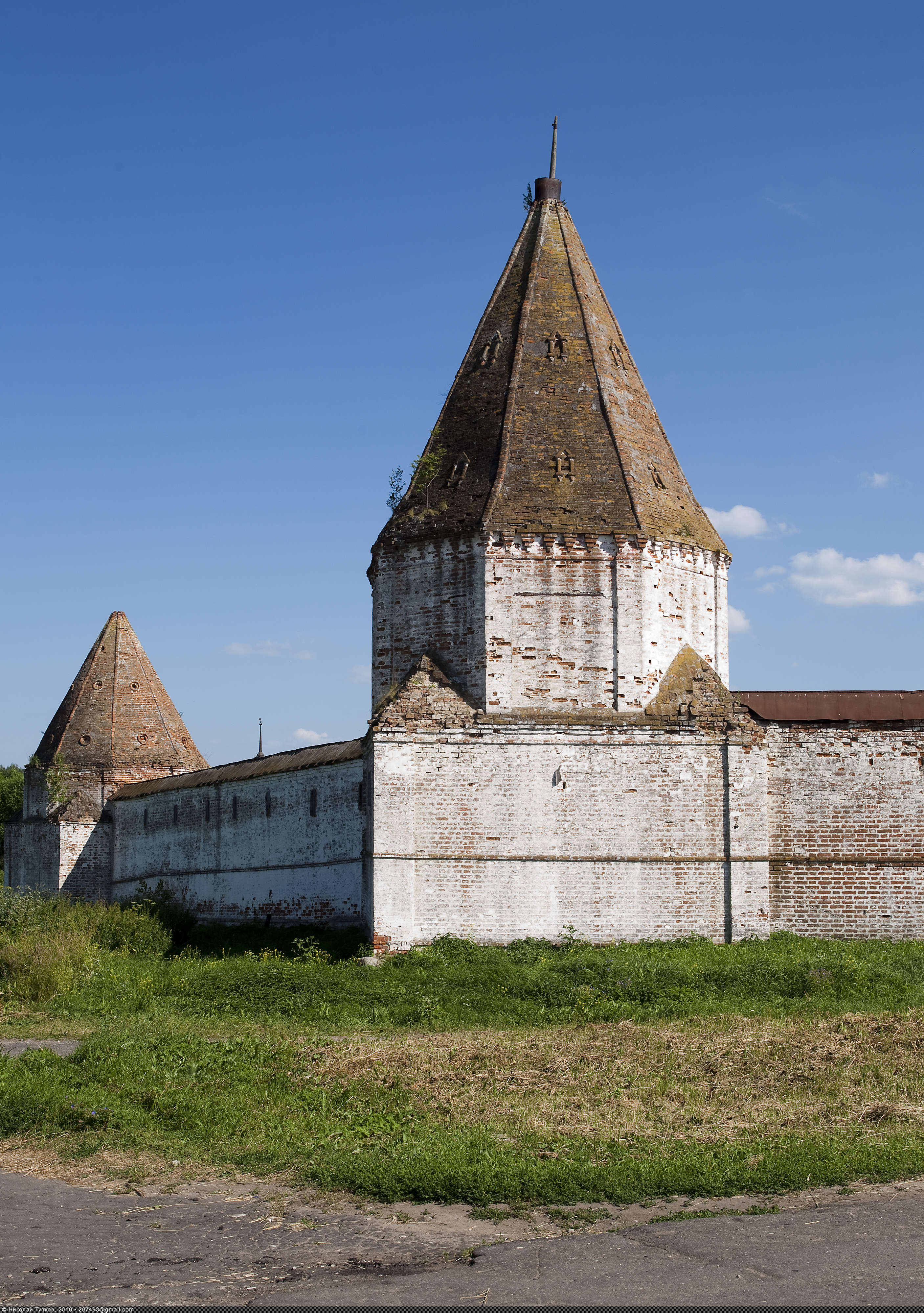 Покровский женский монастырь (Суздаль)